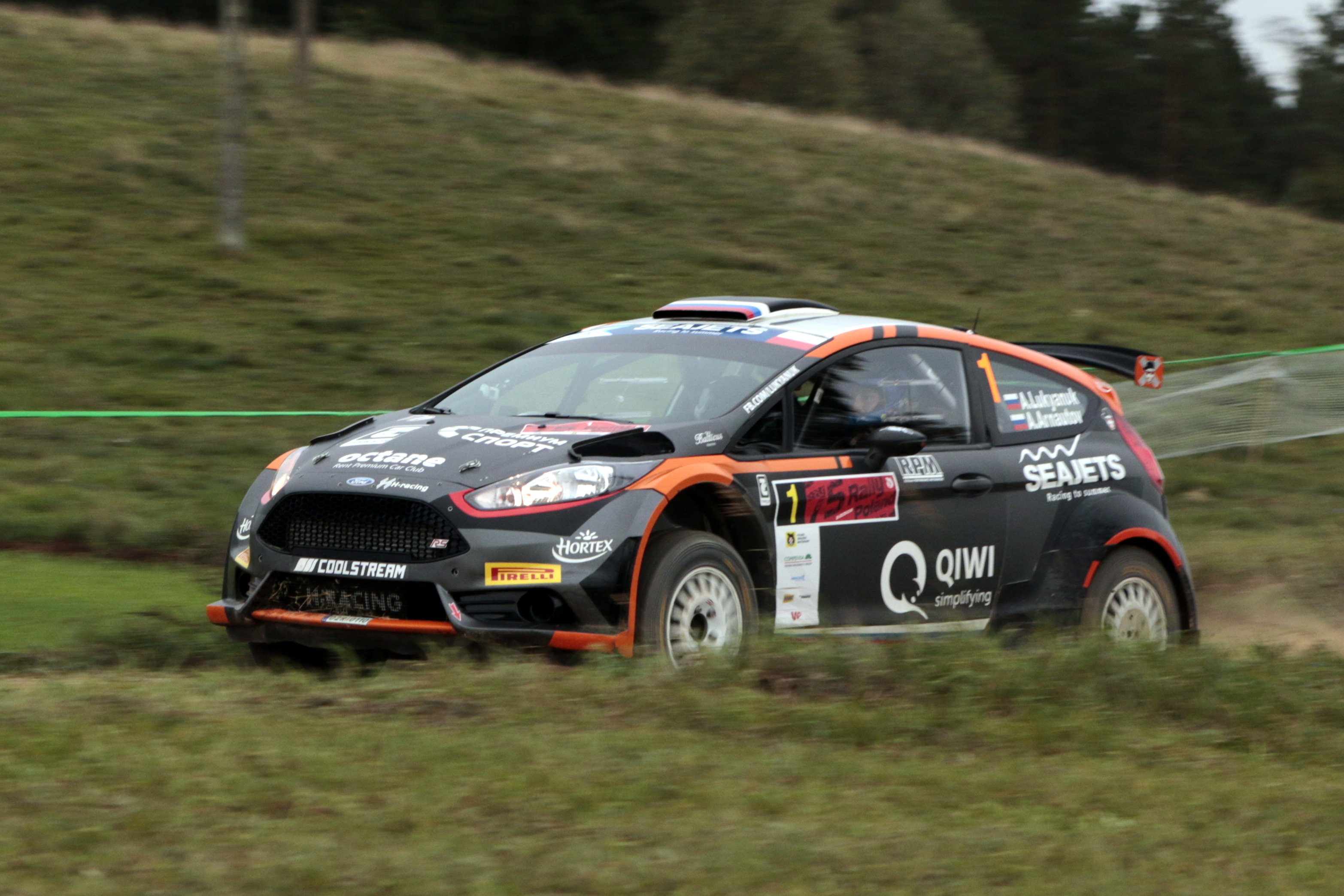 Rajd Polski 2018 - Aleksiej Łukjaniuk